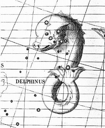 Delphinus